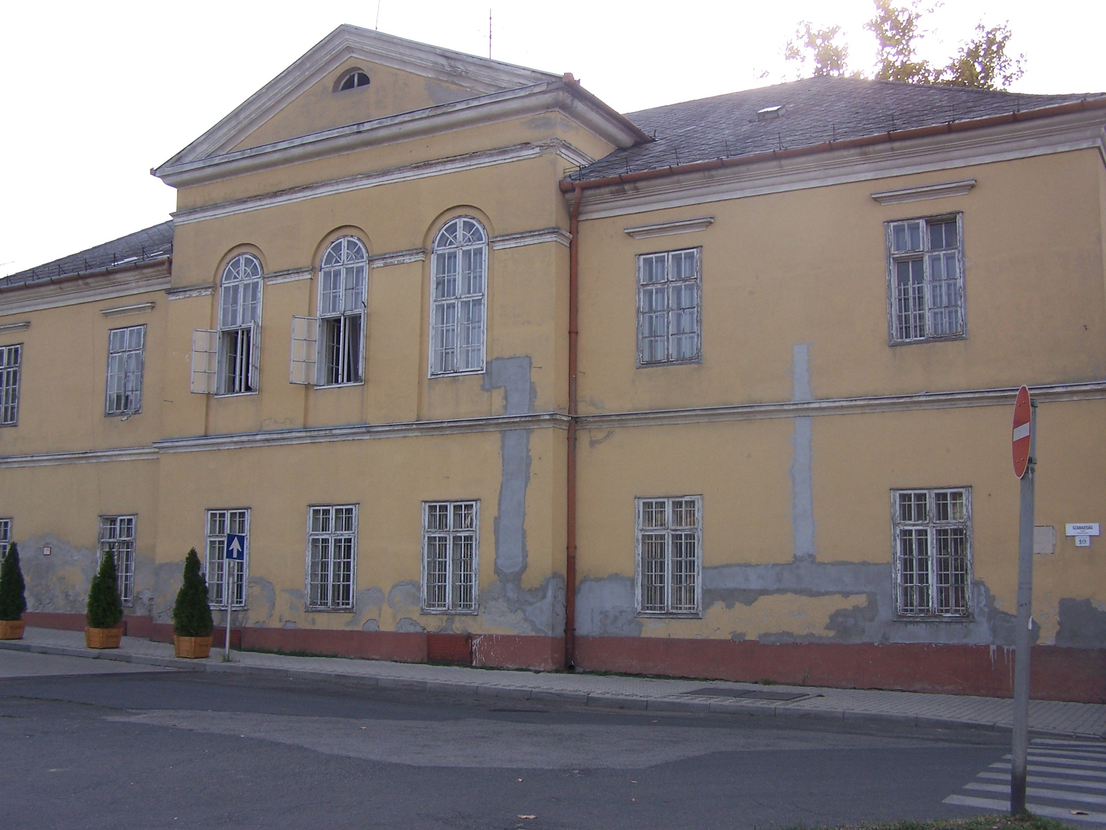 Fegyveres erők klubja, volt kaszinó (Aszód, Szabadság tér 10.) This is a photo of a monument in Hungary. Identifier: 6891